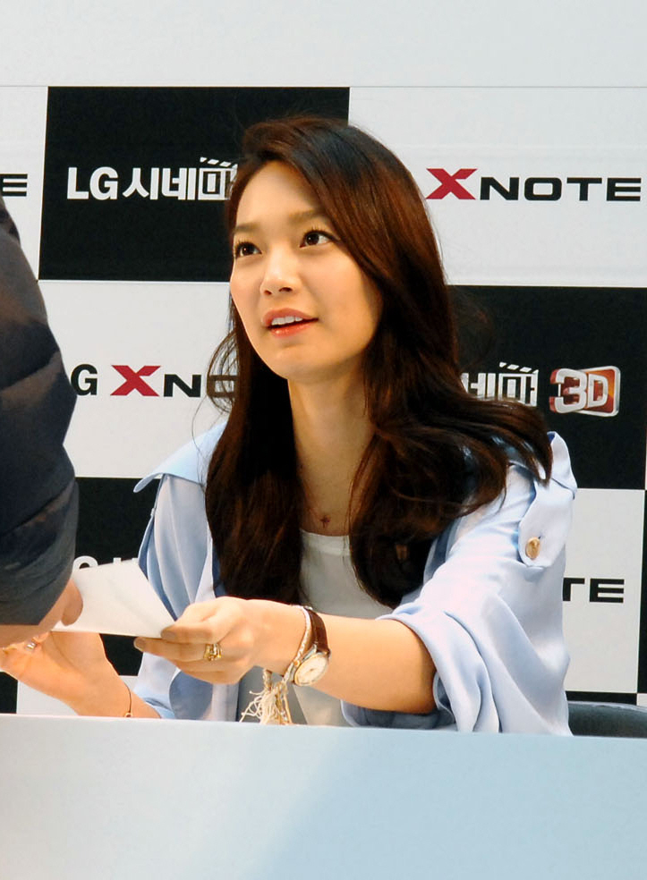 Lg전자가 3월 31일, 4월 1일 양일간 서울 잠실동 롯데월드 아이스링크에서 'lg 시네마3d 월드페스티벌'을 성황리에 개최했다.